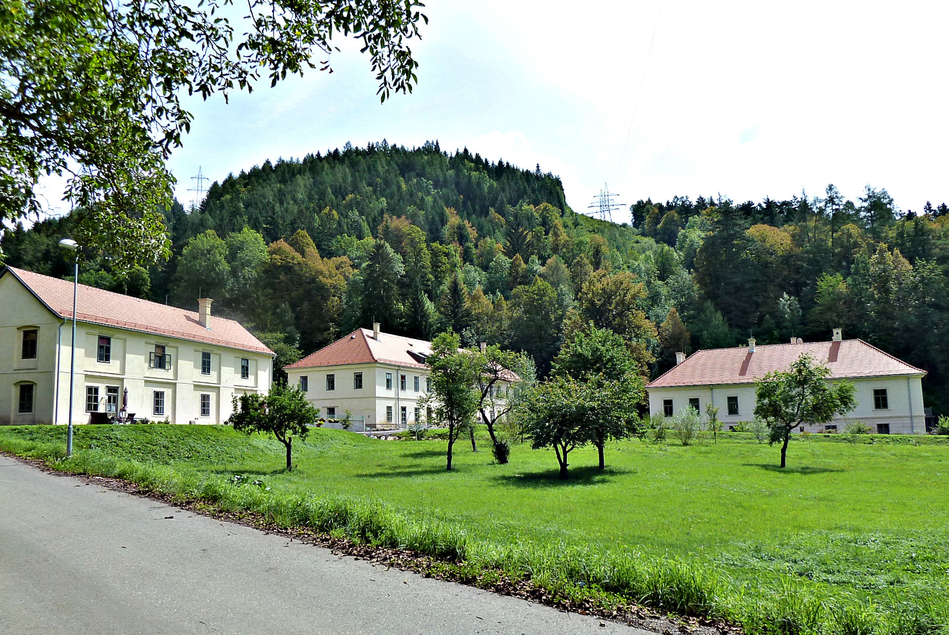 Schloßanlage Freienstein